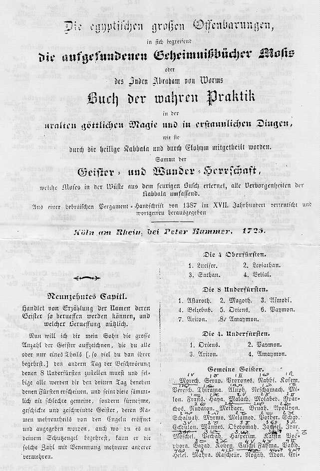 Reprint - so the information given on the page - of a book allegedly published in 1725 with the fictitious publisher Peter Hammer/Pierre Marteau. The alleged 1725 edition is no longer ecxtant. A print published by Scheible in Stuttgart in 1853 is noted in Karl-Klaus Walther's list of German Marteau books [1]. Whether the file on display actually is this 1853 reprint is not clear. "Köln" with K (rather than C) becomes a more regular option only after 1919.